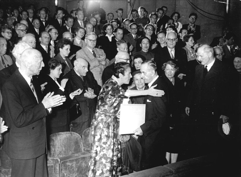 Zentralbild / Sturm / Wittig / 15.5.1955 Schiller-Ehrung vom 8.-15. Mai 1955 in Weimar, 14.Mai 1955, Beim Festakt im Deutschen Nationaltheater in Weimar hielt Thomas Mann die Festansprache. Der Dichter wurde Ehrenmitglied der Akademie der Künste. Minister Dr. h.c. Johannes R. Becher überreichte Thomas Mann die Ehrenurkunde. UBz: Die Anwesenden, besonders seine Tochter, gratulieren Thomas Mann zu der Würde eines Ehrenmitglieds der Akademie der Künste.